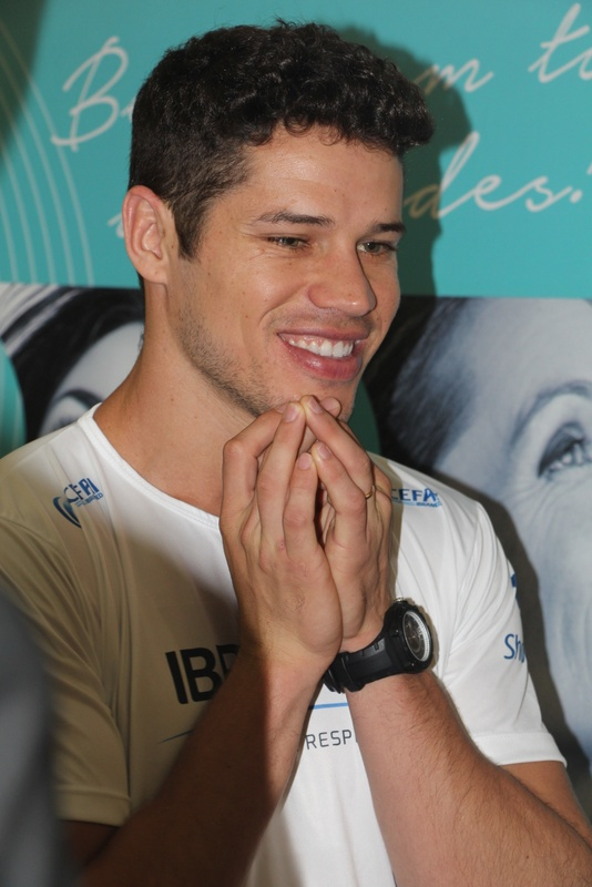 Jose Loreto-006